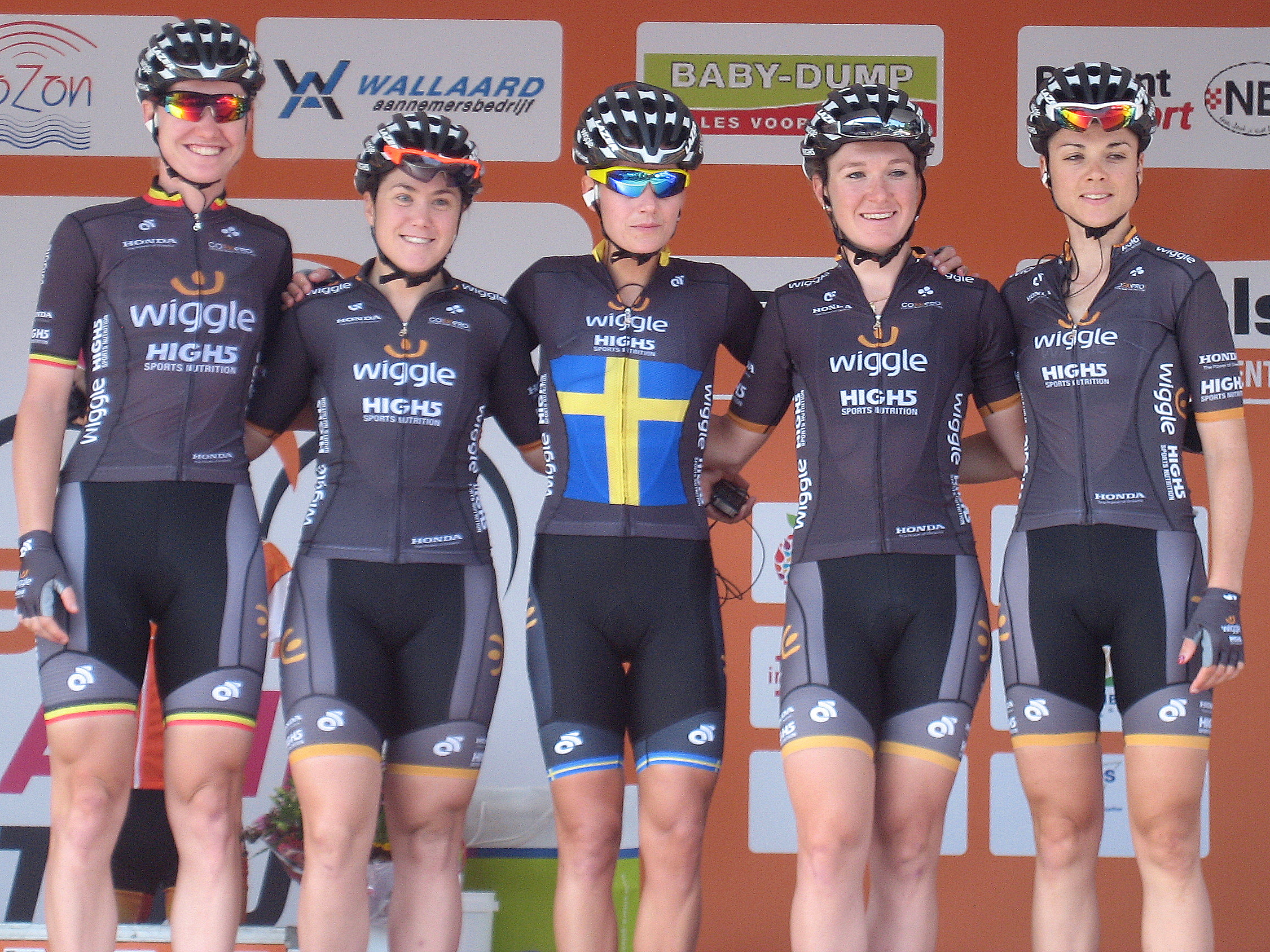 Team Wiggle High5 voor start 3e etappe Holland Ladies Tour 2016